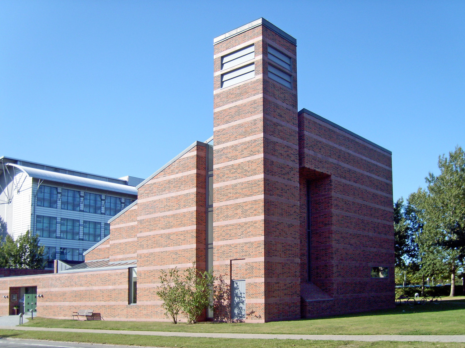 fra sydøst